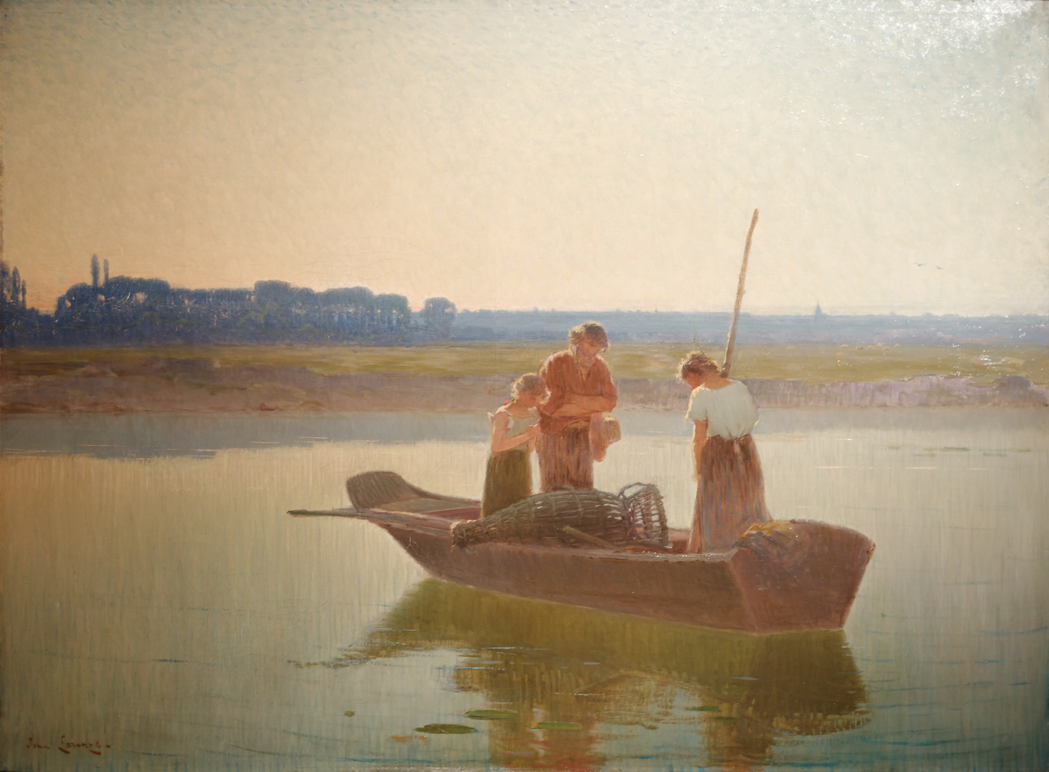 L'angélus, Jean Laronze. S.b.g "Jean Laronze". Huile sur toile 80 x 108 cm. Dépôt de l’État en 1927, Musée des Ursulines de Mâcon. Inv A.790